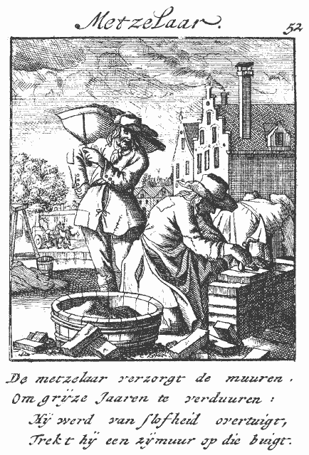 Metselaar, ets van Jan Luyken (1649-1712): Afbeelding der menschelyke bezigheden, eind zeventiende eeuw dus vrij van auteursrechten.